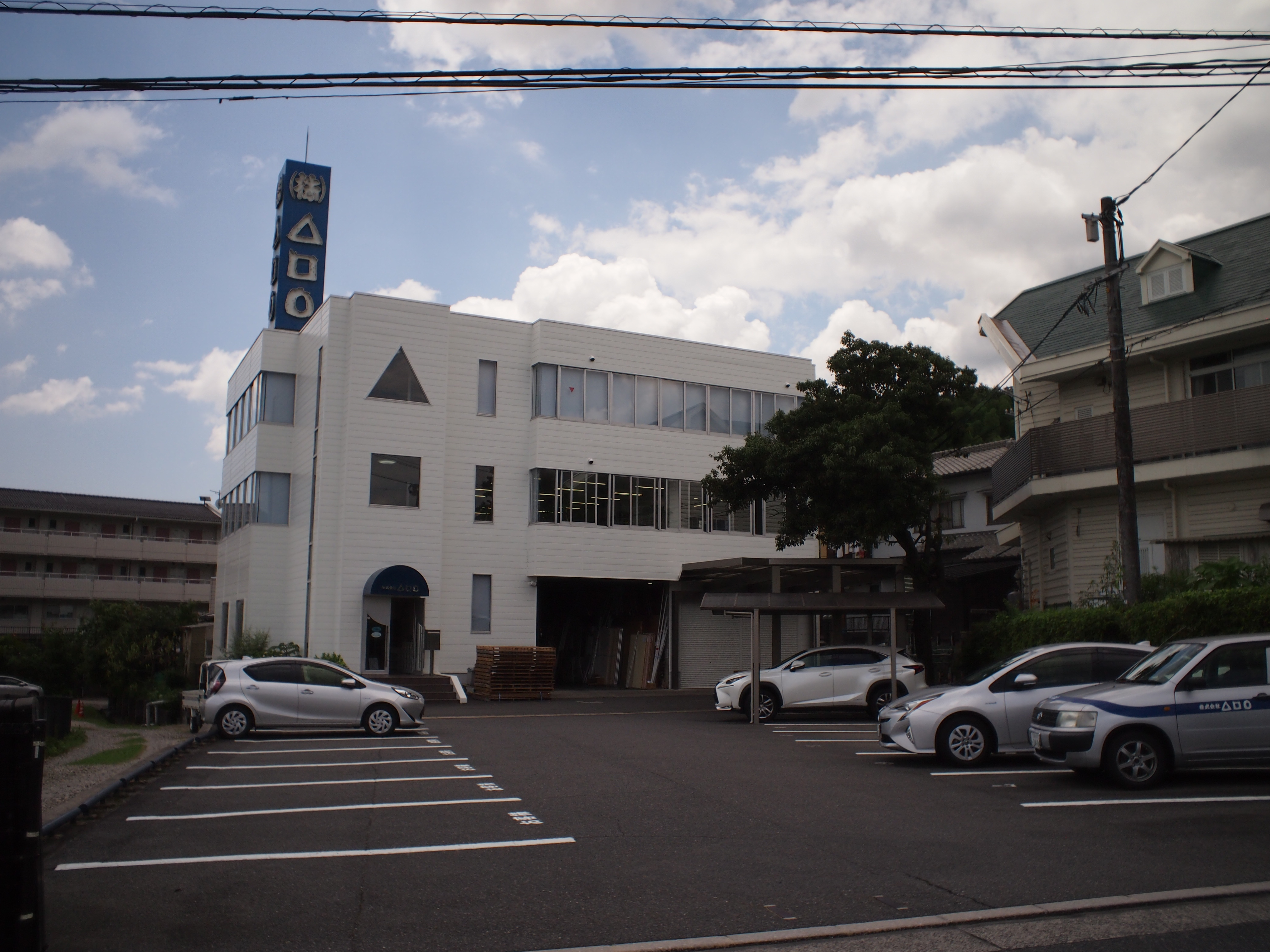 ja:△□○本社